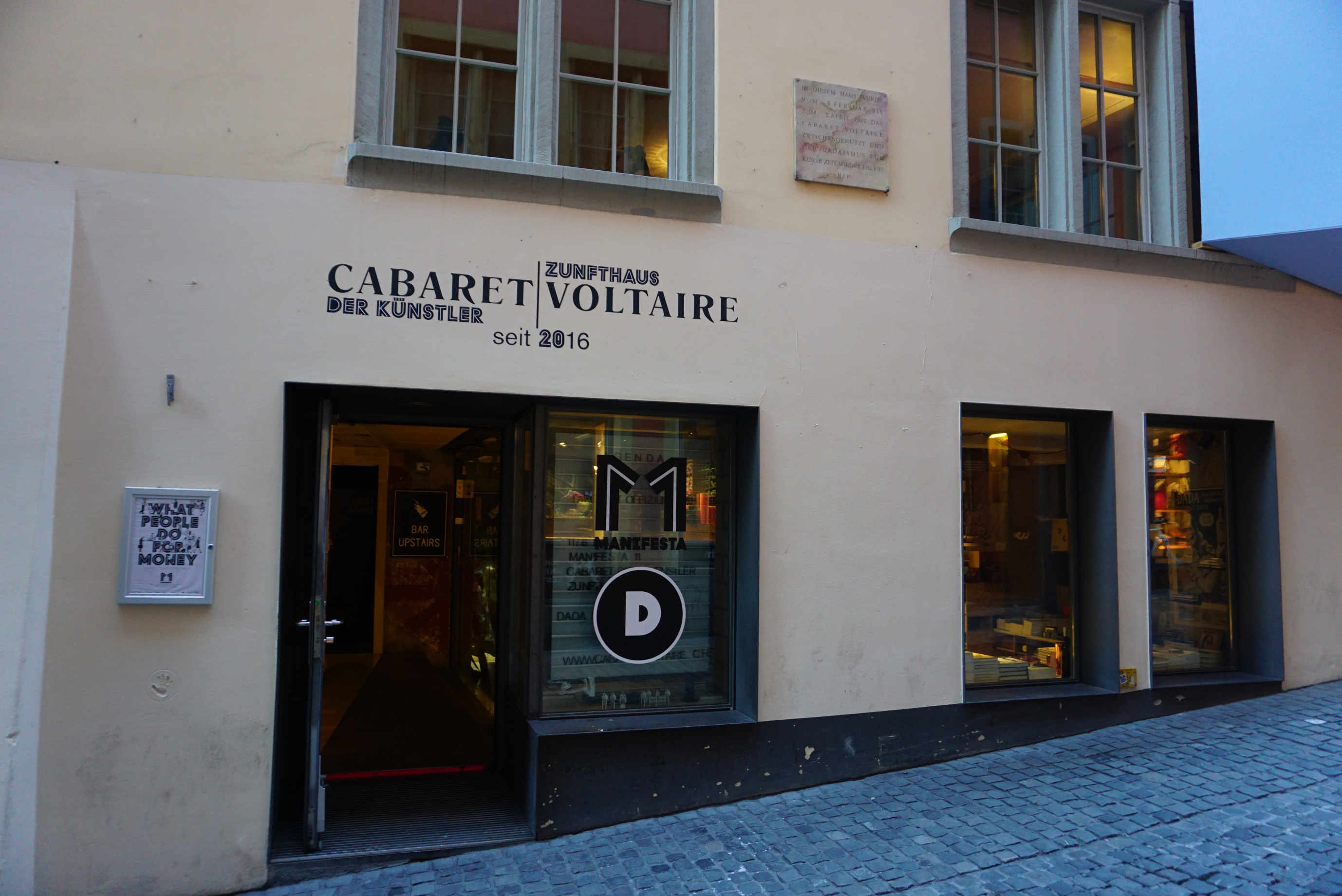 Кабаре Вольтер. 100-летие дадаизма. Цюрих, сентябрь 2016 года.